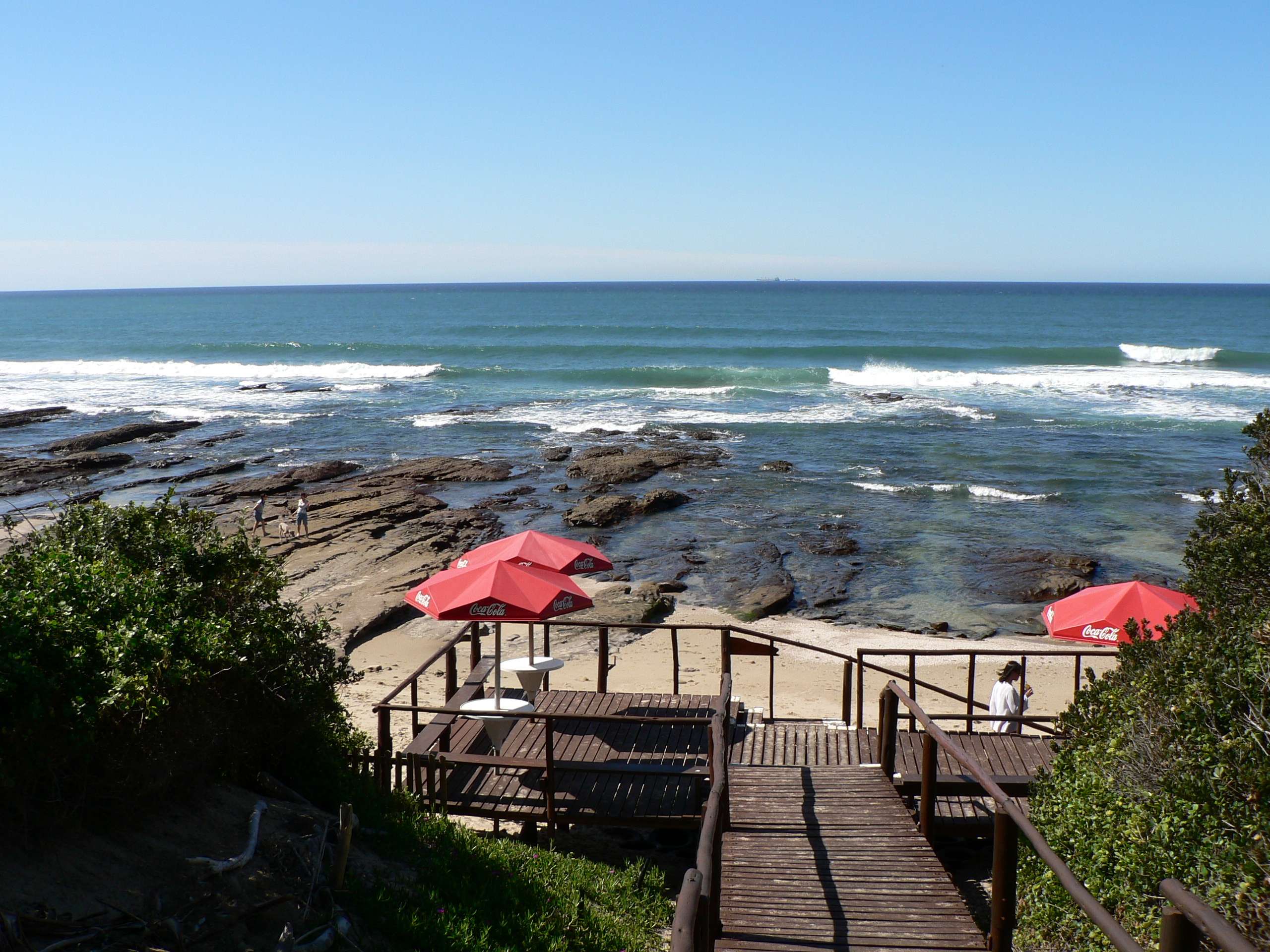 Queensberry Bay deck